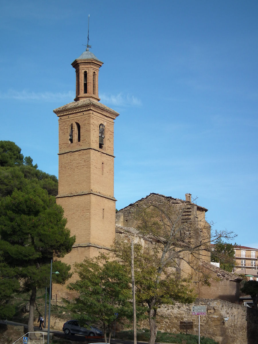 Iglesia de Pedro de Lizarra, Estella, Navarre, Spain